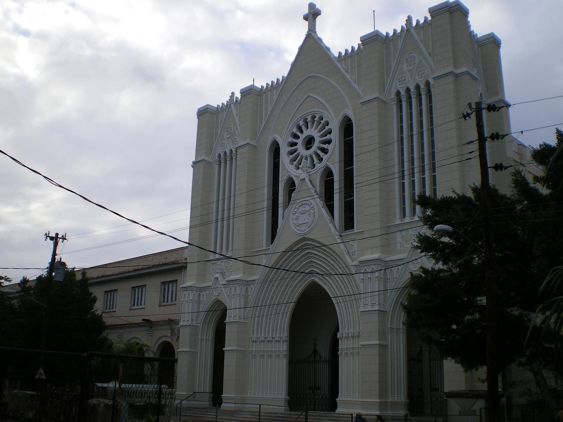 Parroquuia San Juan de Letran de La Habana